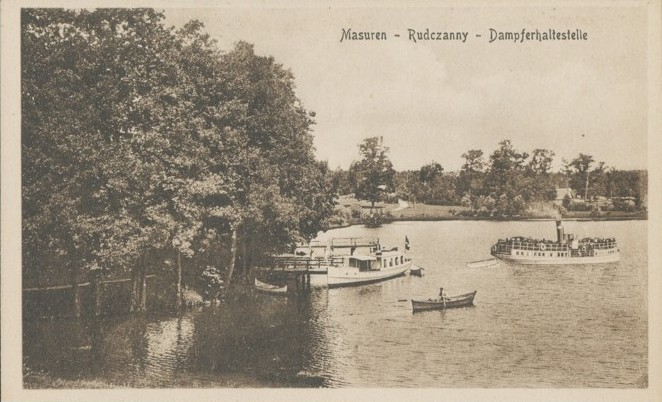 Przystań w Rucianych ok. 1915 Masuren